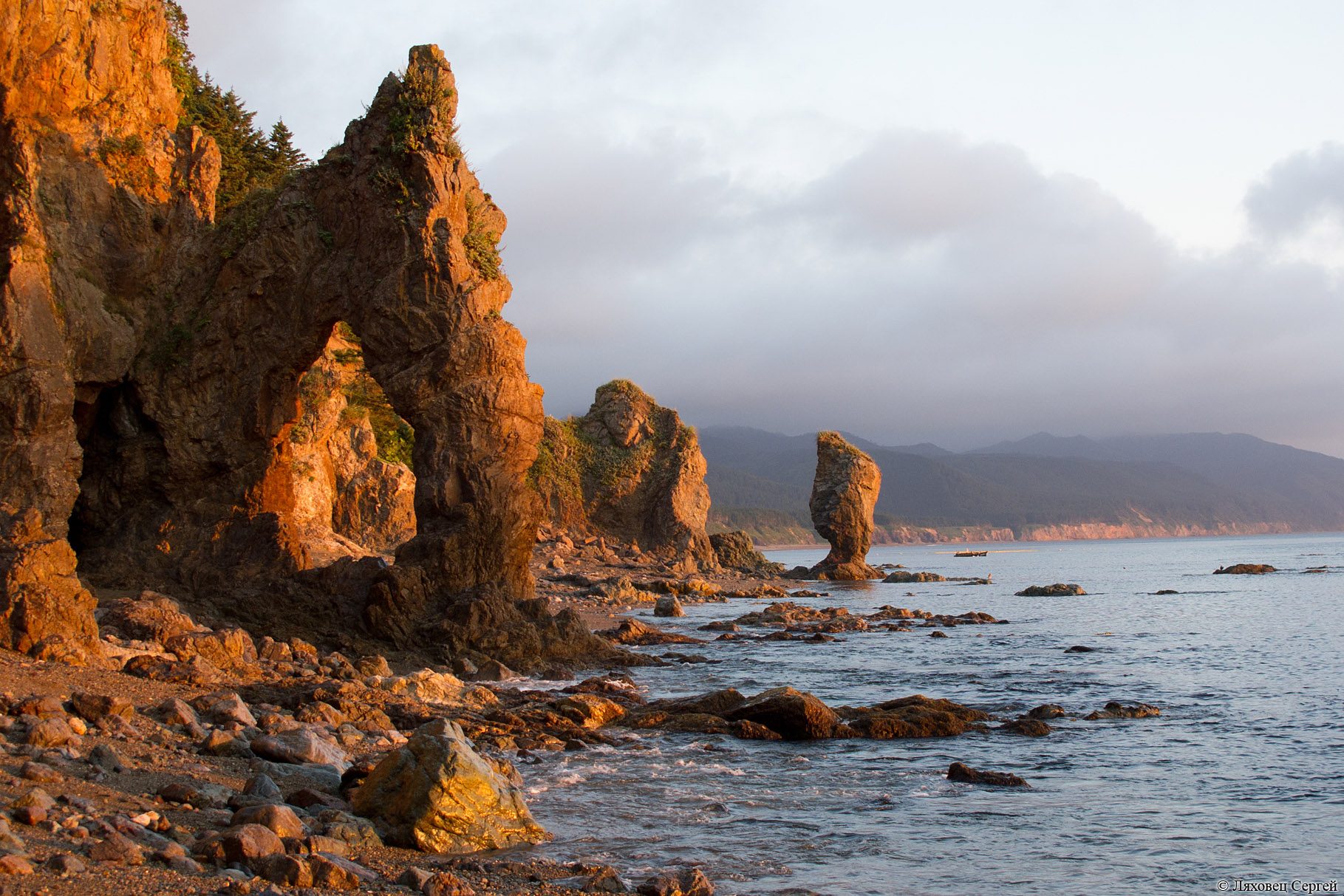 Мыс Великан: Юго-восток Сахалина, восточное побережье Тонино-Анивского полуострова. Географические координаты: Центр - 46°37'24" N 143°31'12" E.,Корсаковский район, Сахалинская область This image is related to the protected area of Russia number 6510030